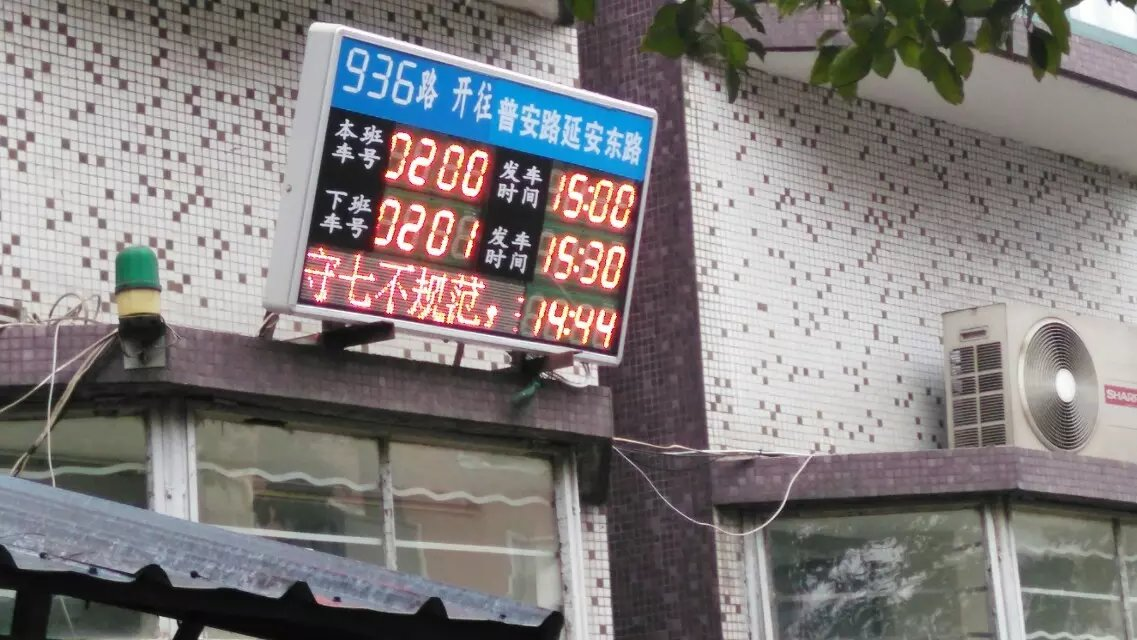 上海公交936路龙柏新村站调度显示屏